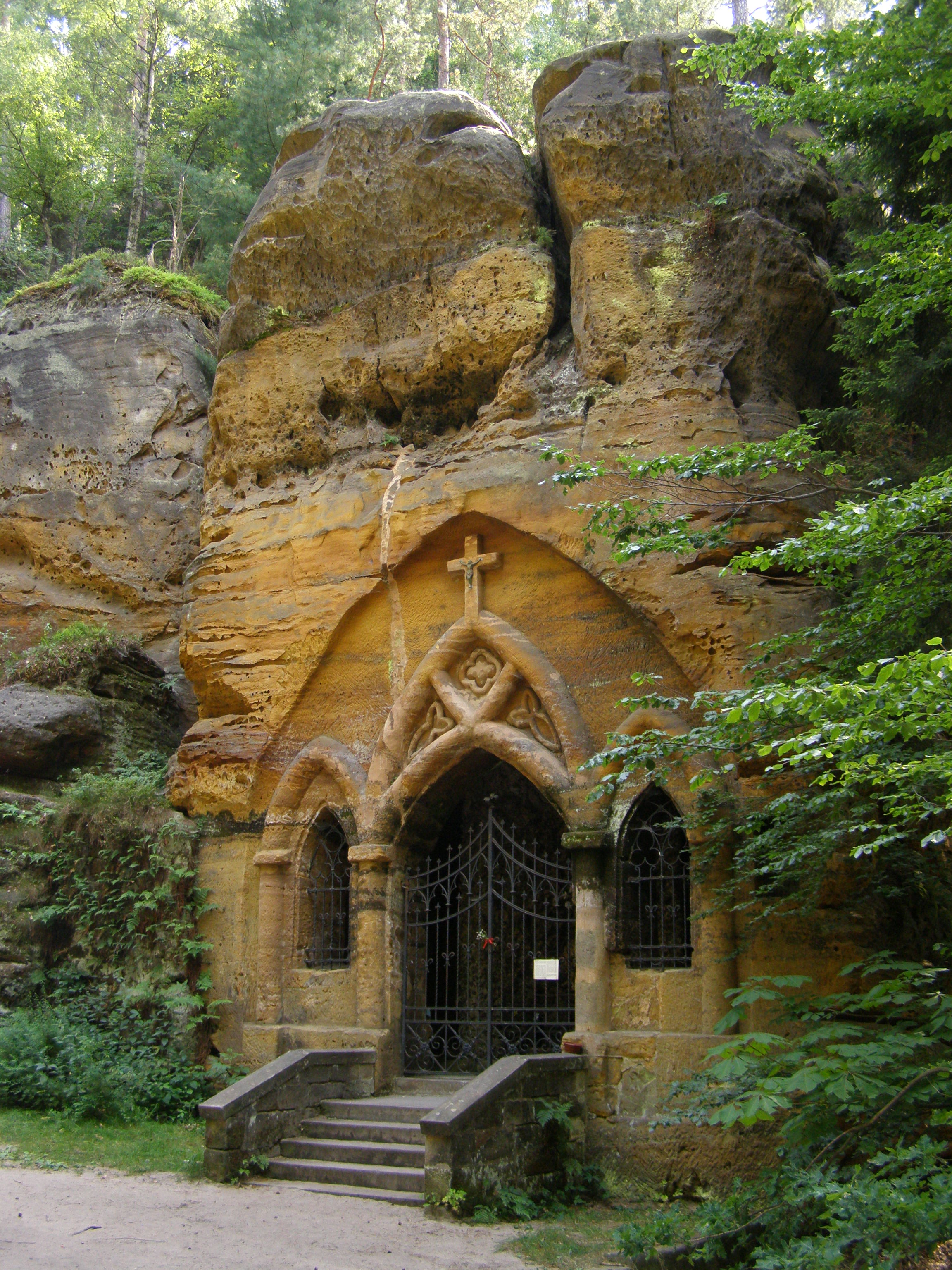 Svojkov, Modlivý důl, skální kaple Panny Marie Lurdské